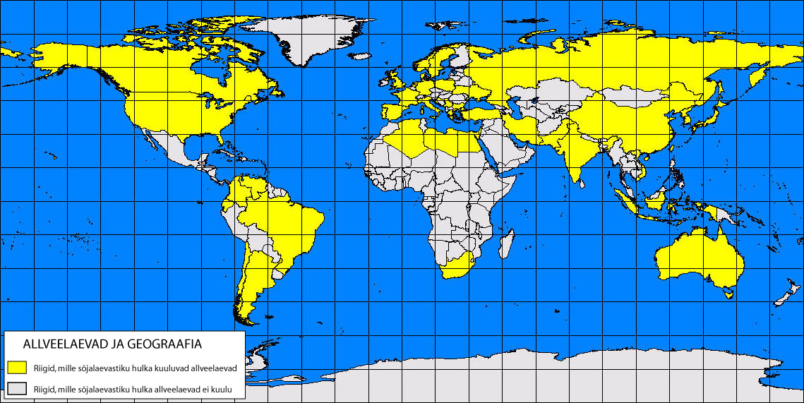 Riigid, mille sõjalaevastiku hulka kuuluvad allveelaevad